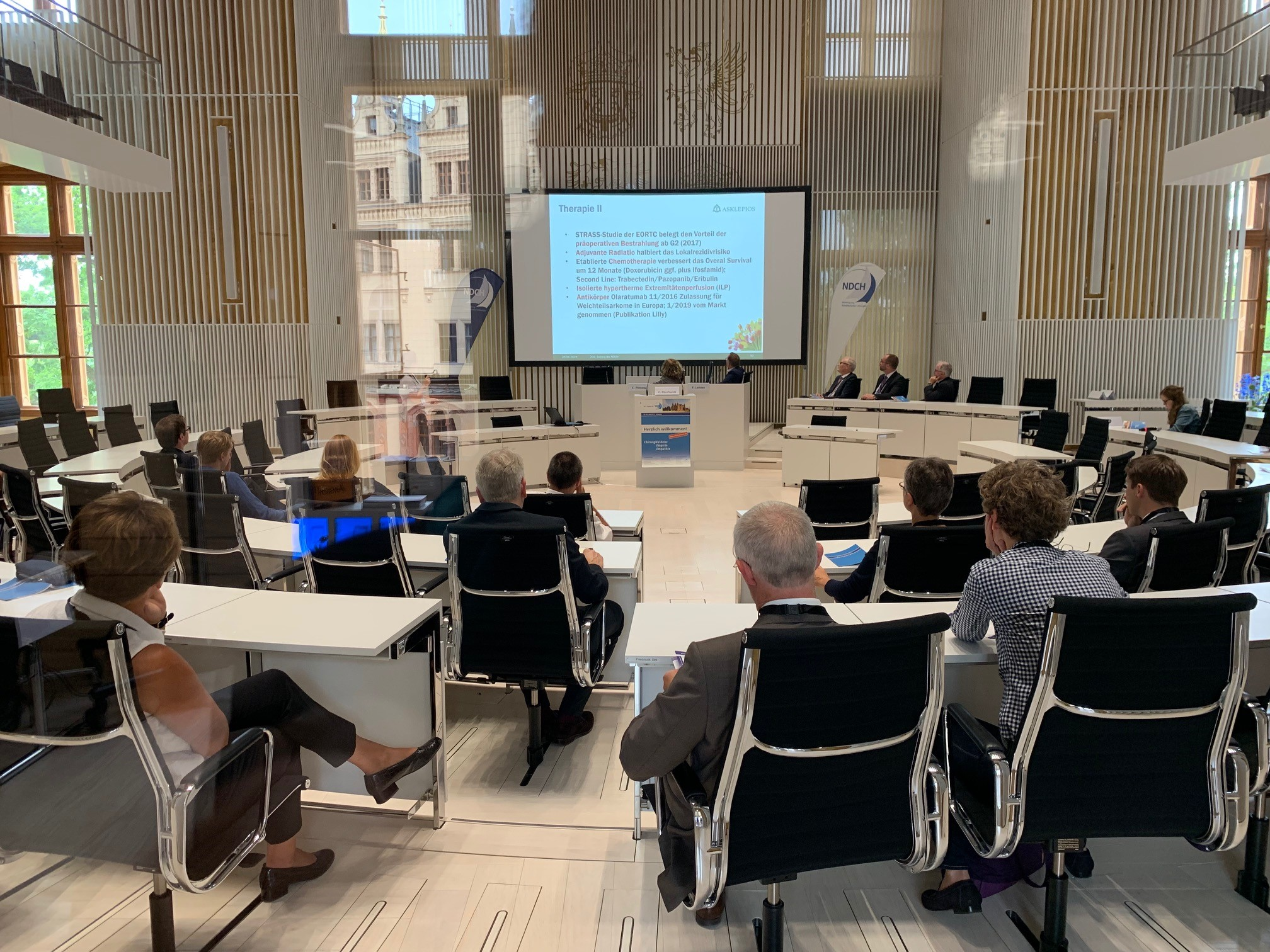 Vortrag während der Sommertagung der Vereinigung Norddeutscher Chirurgen im Gebäude des Landtags von Mecklenburg-Vorpommern